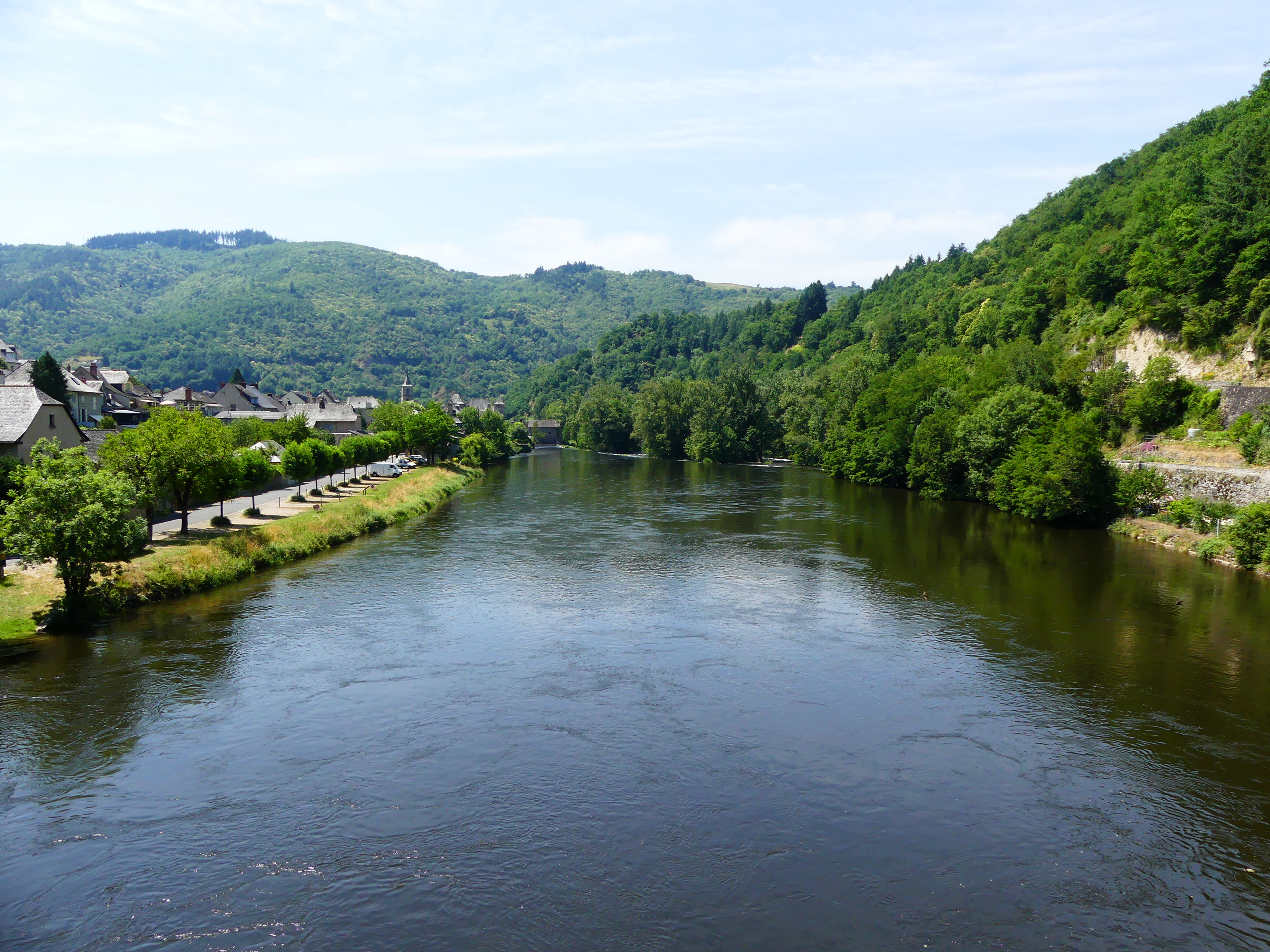 La Truyère au niveau du vieux pont, Entraygues-sur-Truyère, Aveyron, France. Vue prise en direction de l'aval.